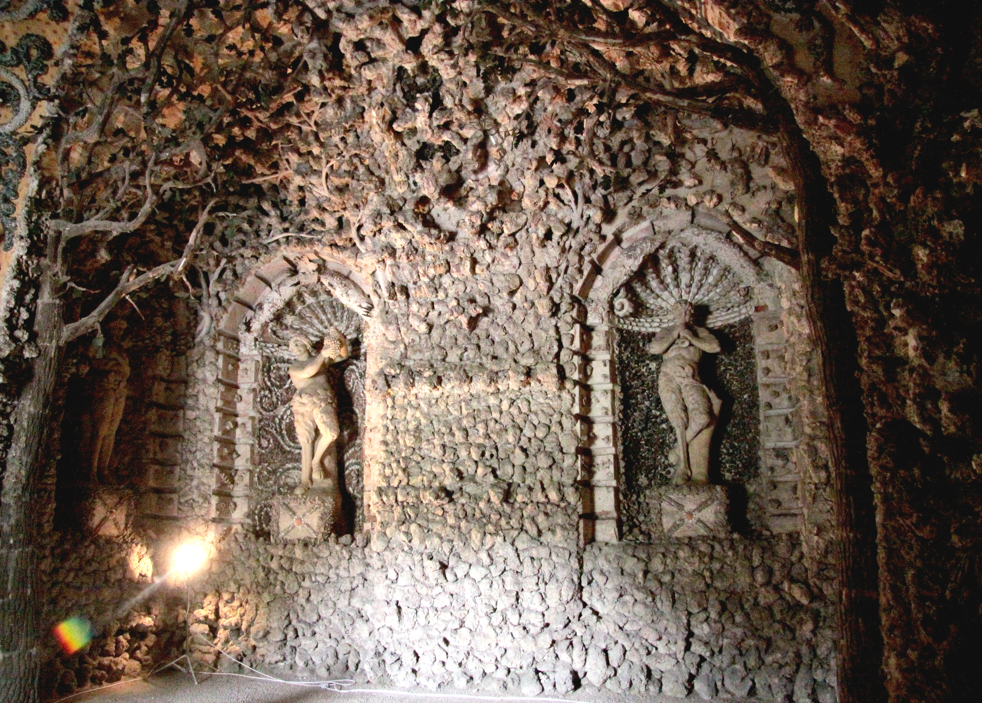 Grotta - sala terrena zámek Kroměříž